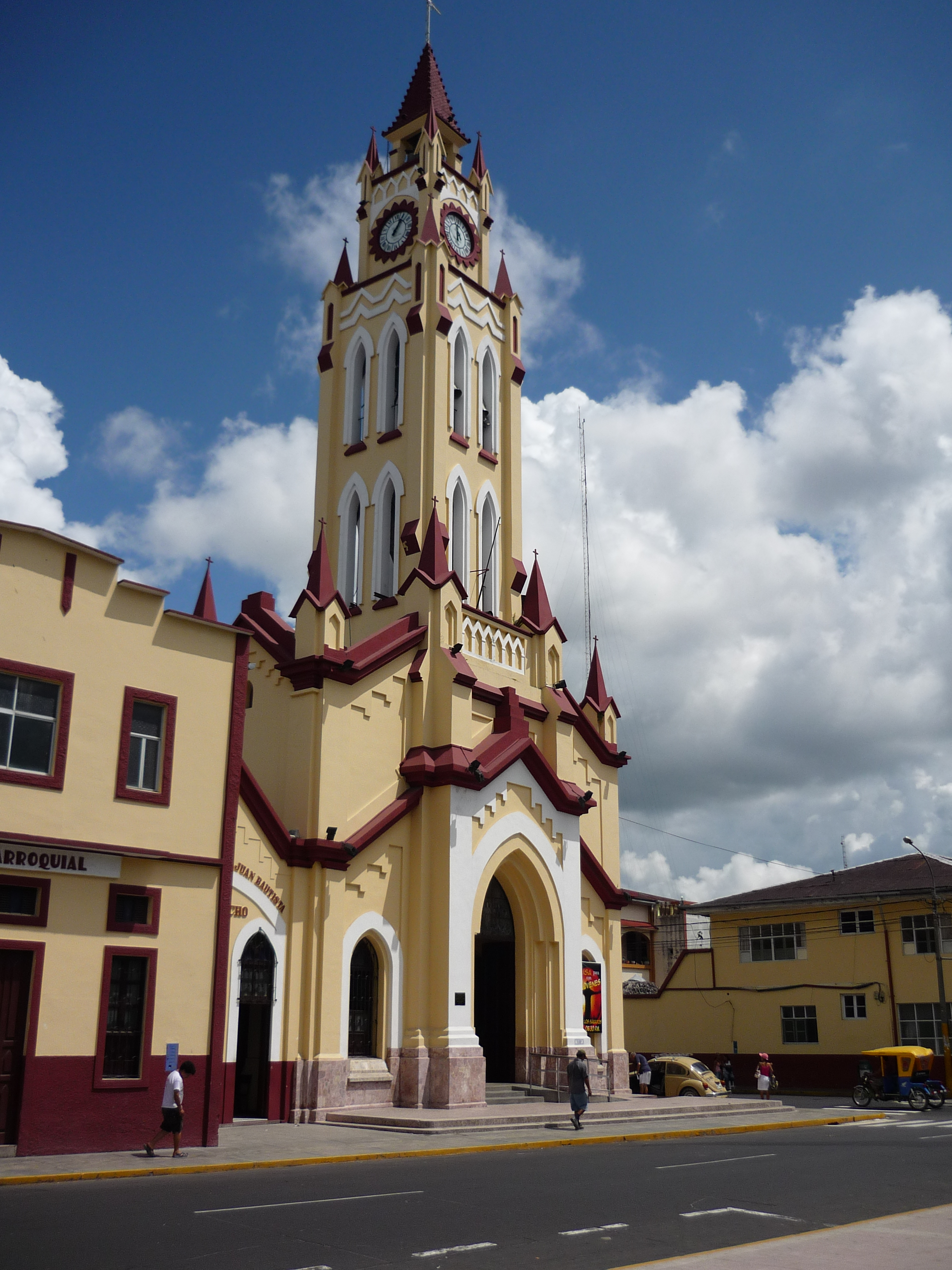 Iglesia Matriz de la ciudad de Iquitos ; La fotografía es de mi propiedad y muestra a la Iglesia matriz de la ciudad de Iquitos